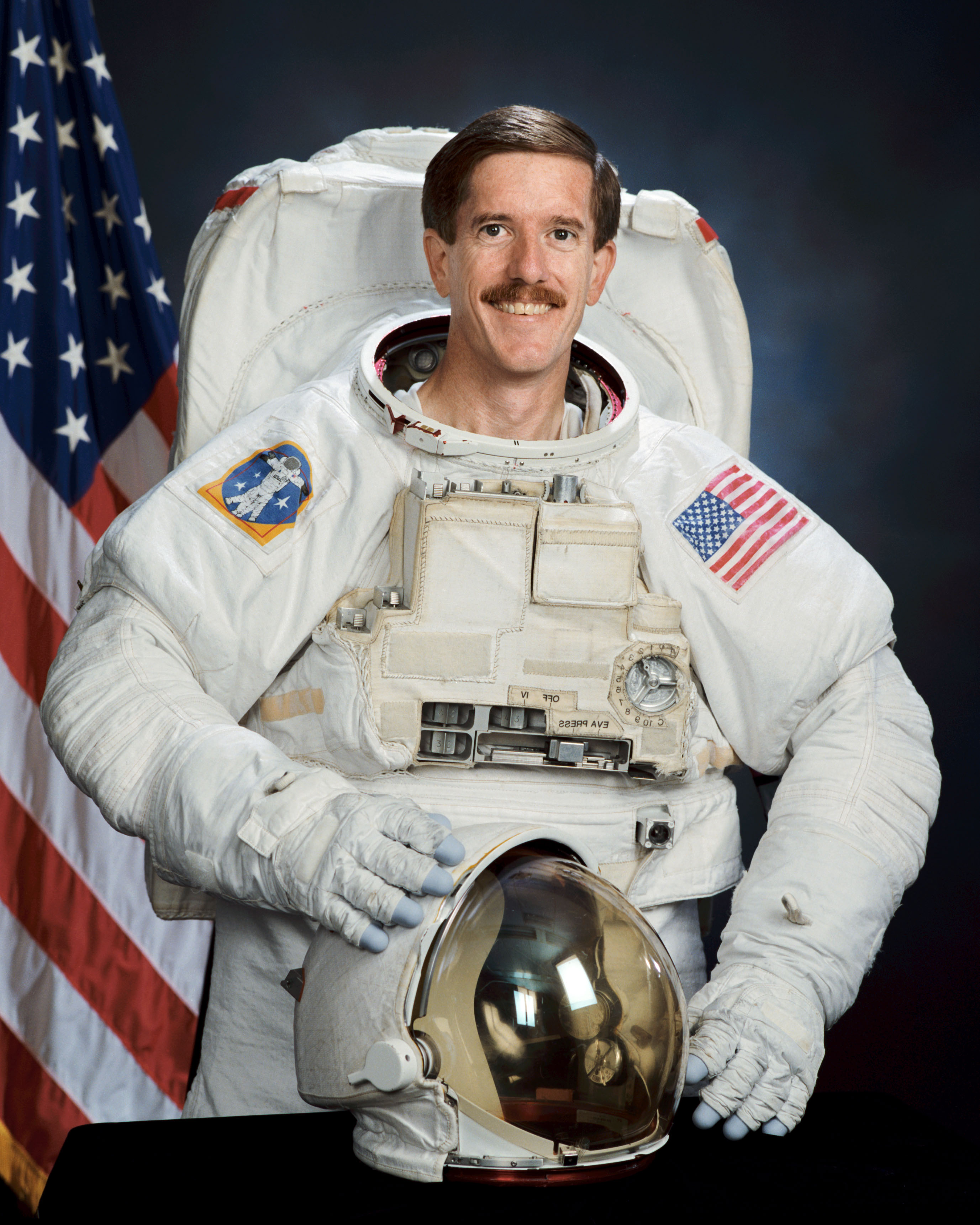 portrait astronaut James F. Reilly